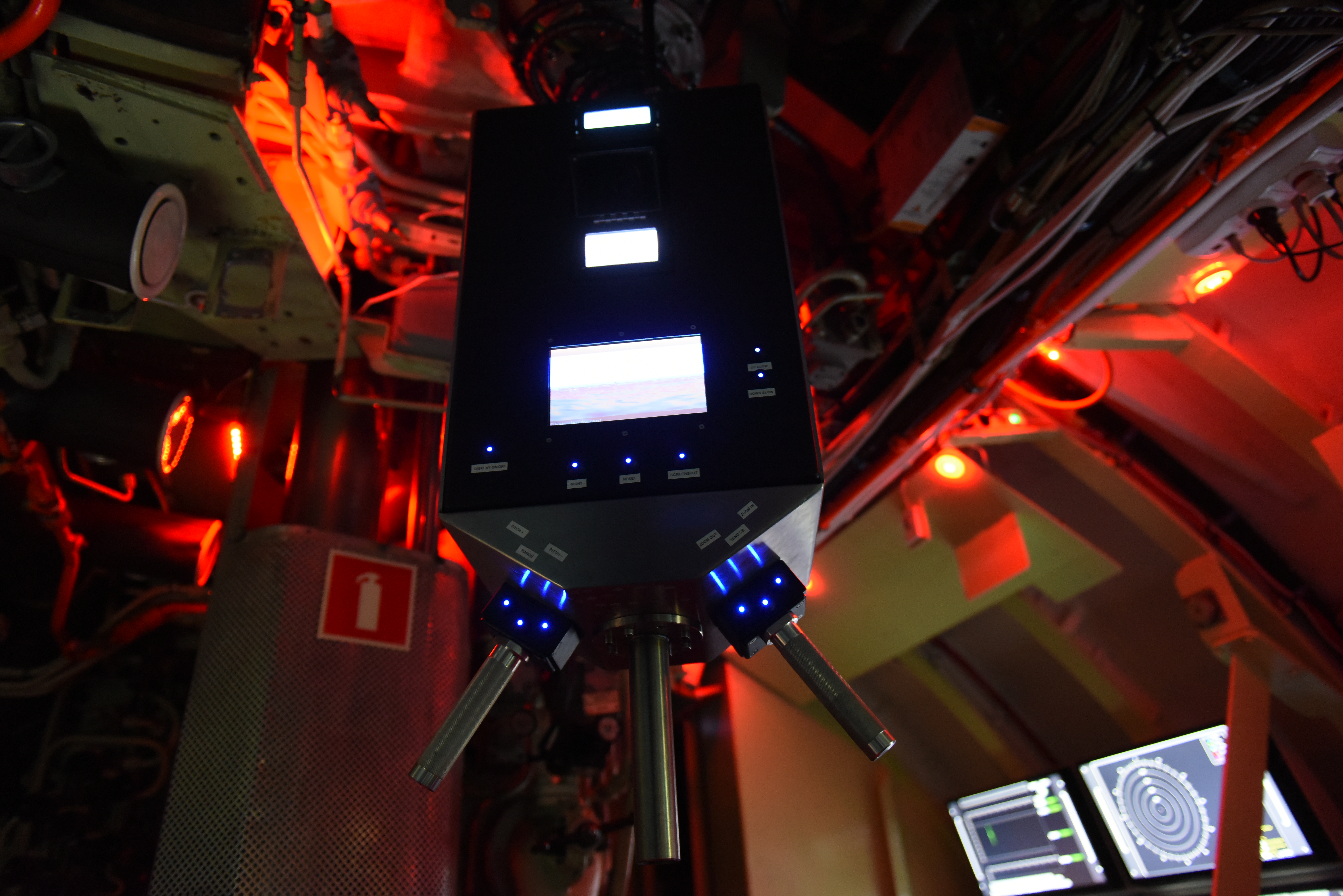 Okręt podwodny typu Kobben (nieoficjalna nazw „Jastrząb-Kobben) przeniesiony został na teren Akademii Marynarki Wojennej w 2011 roku. Funkcjonuje jako symulator, wyposażony w laboratoria i stanowiska badawcze. Jednostka waży 370 ton, ma 45,5 metra długości, 4,6 metra szerokości i 8,9 metra wysokości. Okręt przypłynął do Polski z Norwegii w 2002 roku jako jedna z pięciu jednostek tego typu. Wykorzystywany był jako baza części zamiennych.